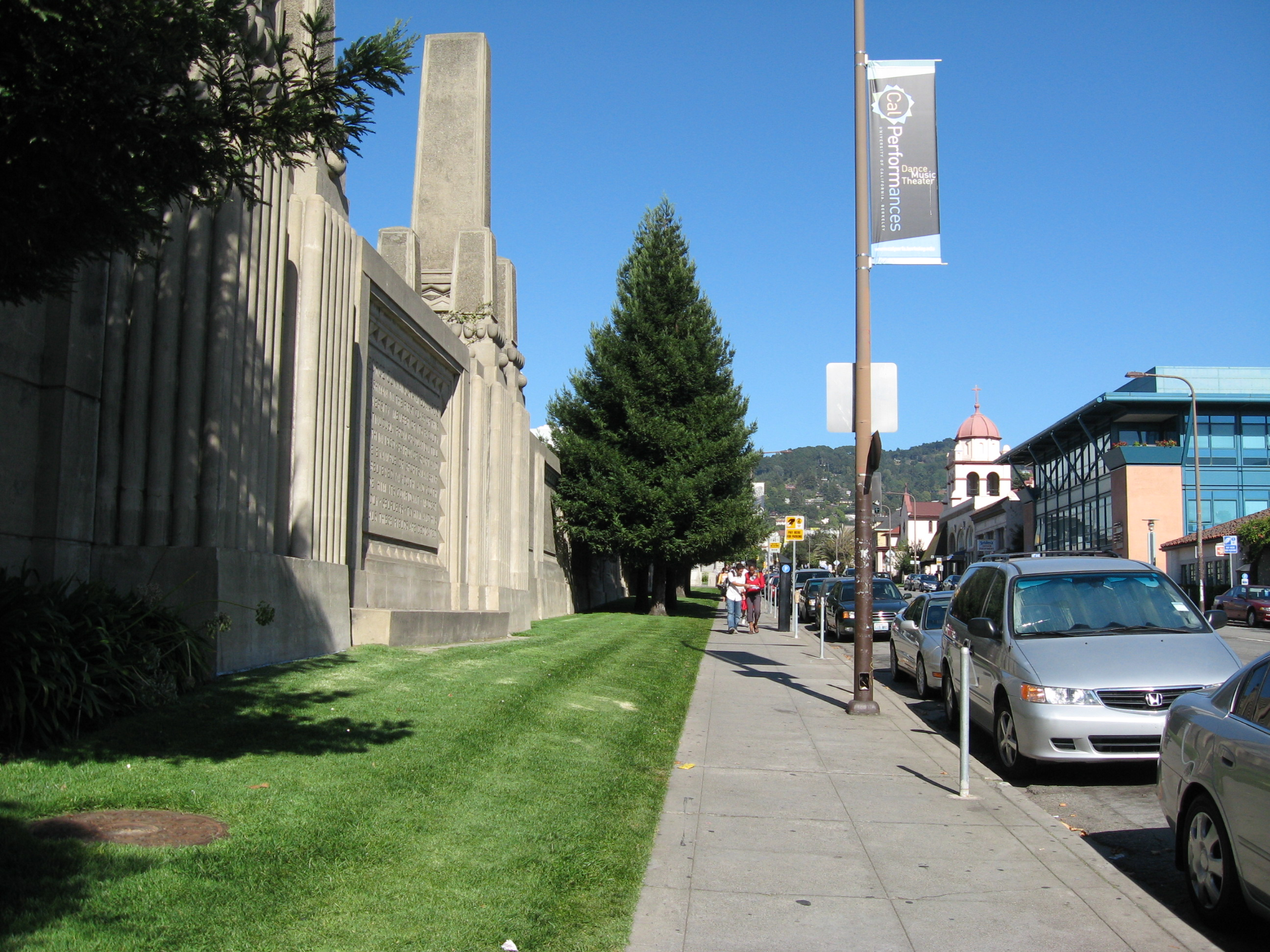 U.C. Berkeley